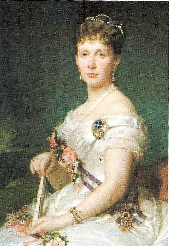 Retrato de Isabel de Borbón y Borbón (1851-1931), infanta de España e hija de la reina Isabel II de España y del rey Francisco de Asís de Borbón.